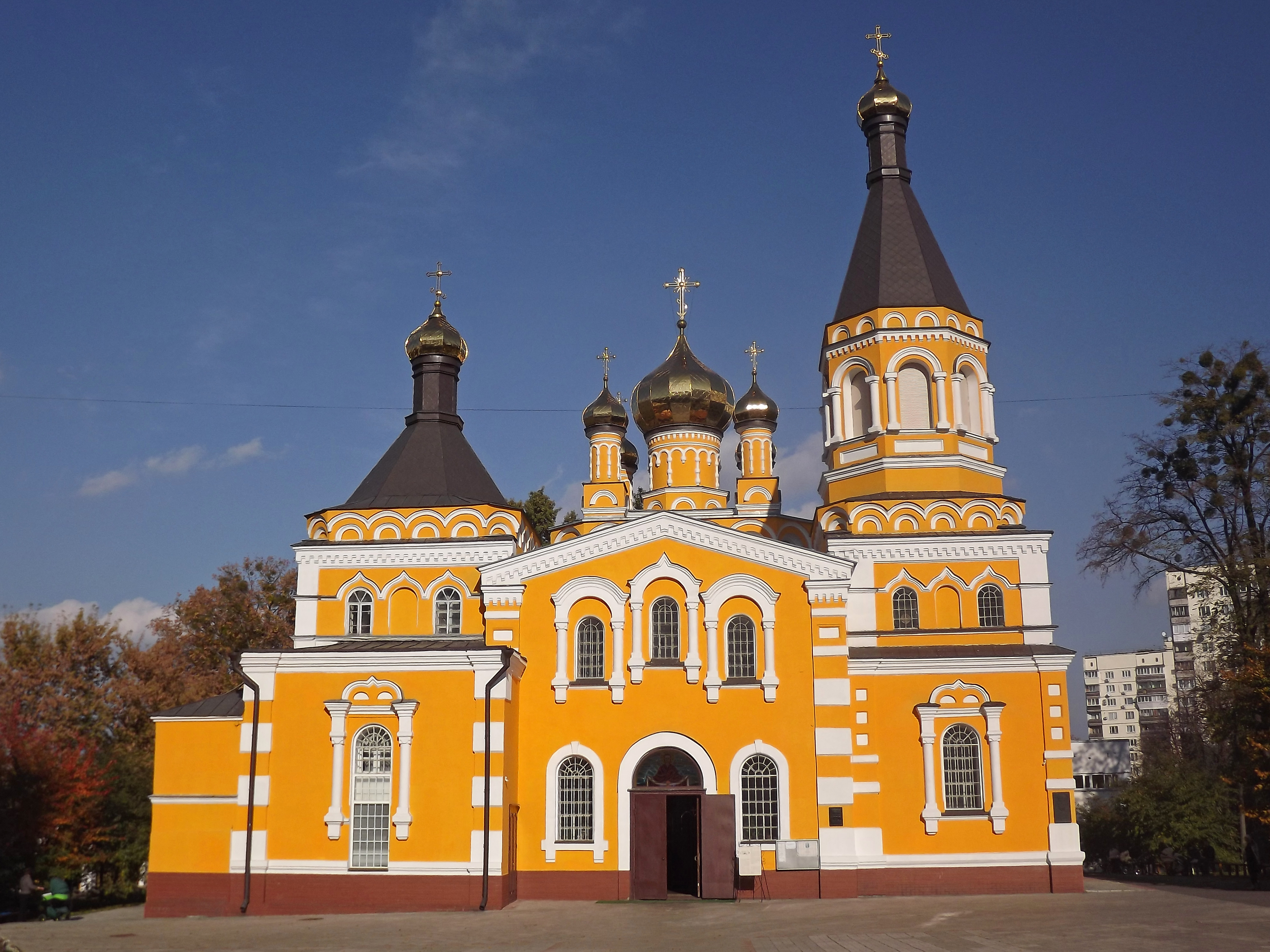 Церква Покровська, Київ, Островського Миколи вул., 20/1